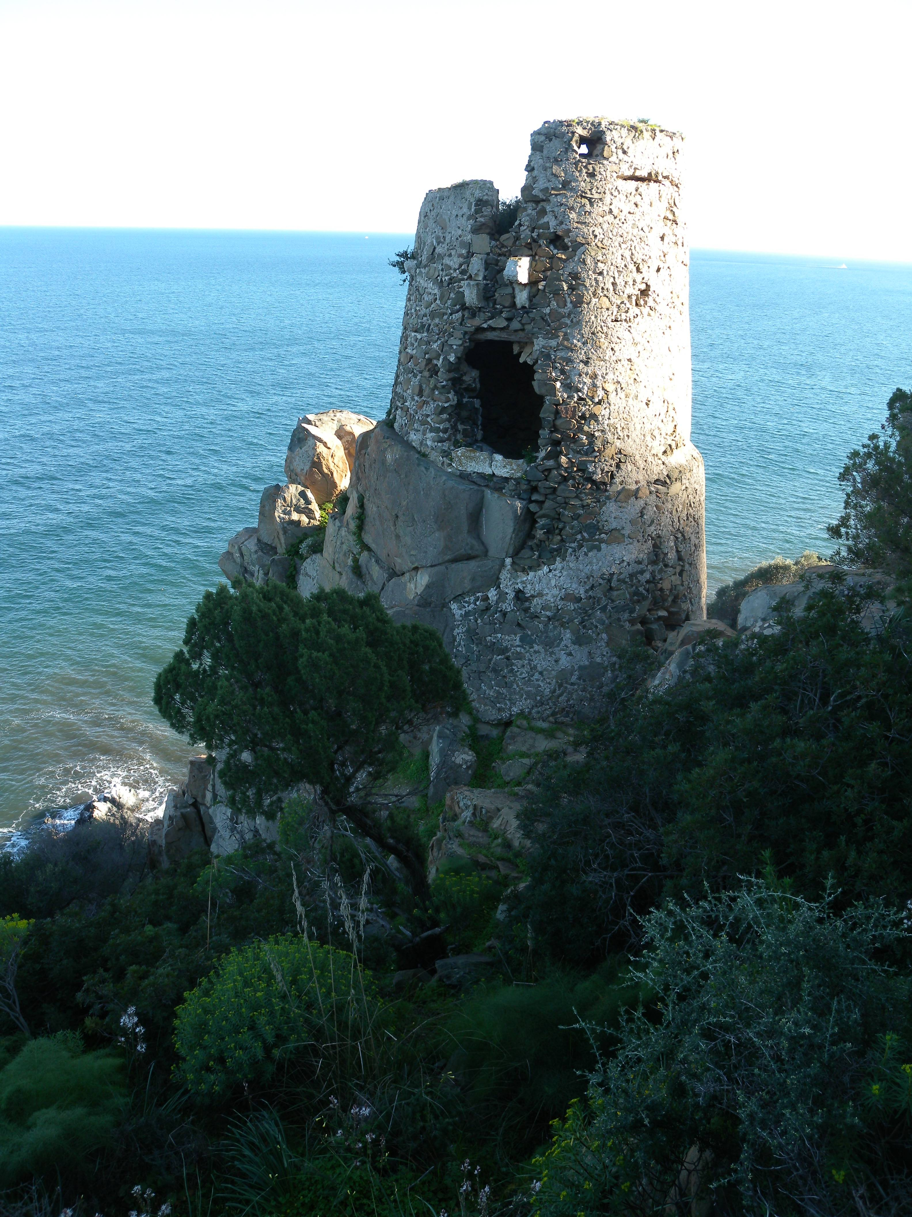 Torre costiera della Sardegna